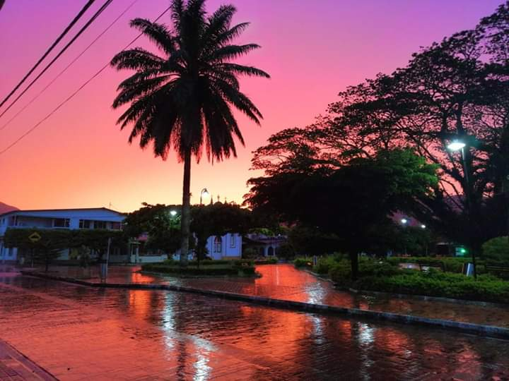 Esta fotografía fue tomada en un área protegida de Colombia con el código 85001 del RUNAP.